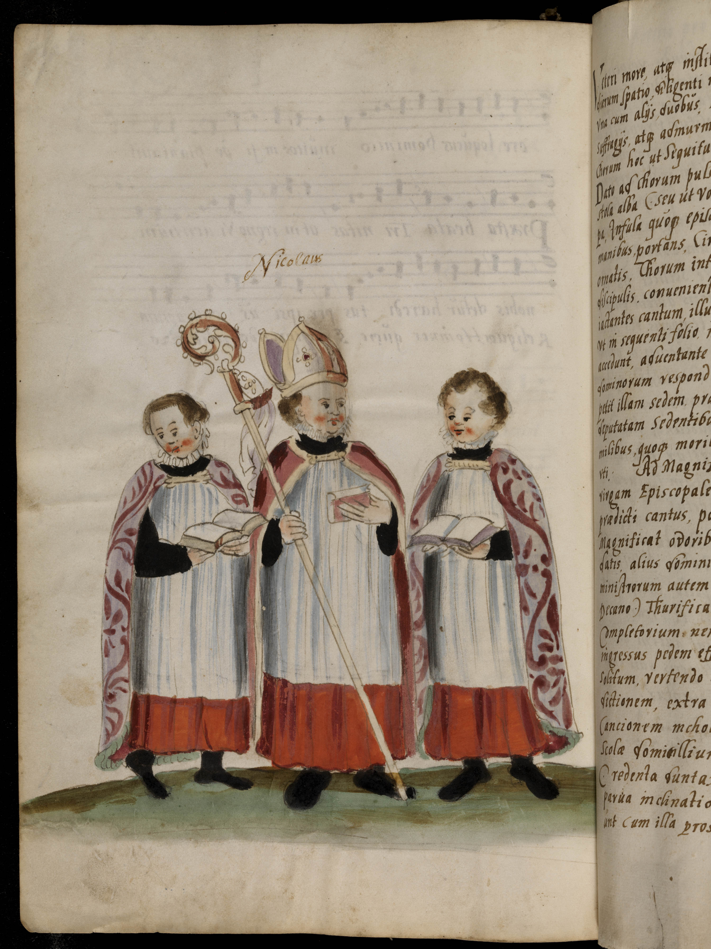 Darstellung des sog. Kinderbischofs. Bamberg, 16. Jh. (HV.Msc.476, fol. 251v). In: Index omnium festorum et sanctorum secundum ordinem Stephaninae ecclesiae Bambergae annuatim dies demonstrans - Staatsbibliothek Bamberg HV.Msc.476